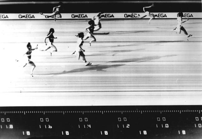 100m-Weltrekordlauf Marlies Oelsner, Zielfoto ADN-ZB Tele 2.7.77 Dresden: DDR-Leichtathletik-Meisterschaften Den 100-m-Weltrekordlauf von Marlies Oelsner (SC Motor Jena) in 10,88 Sekunden vom 1.7.1977 sah die Zielkamera so: Oelsner, M. Hamann, I. Brestrich, R. Schneider, B. Eckert, M. Dalchow, S. Briebsch, S. Kuchling (v.r.n.l.) . [Vlnr: S. Kuchling, S. Briebsch, M. Dalchow, Bärbel Eckert (verheiratete Bärbel Wöckel), R. Schneider, I. Brestrich, Monika Hamann, Marlies Oelsner (verheiratete Marlies Göhr)] Abgebildete Personen: Göhr, Marlies: Leichtathletin, DDR Hamann, Monika: Läuferin, DDR Wöckel, Bärbel: Leichtathletin, Läuferin, SC Motor Jena, Olympiateilnehmerin 1976 und 1980, Vaterländischer Verdienstorden (VVO) in Gold 1950, DDR